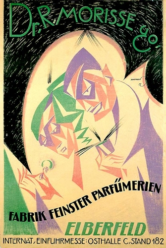 Walter Kampmann Morisse Elberfeld. Einfuhrmesse Frankfurt am Main Osthalle 1919